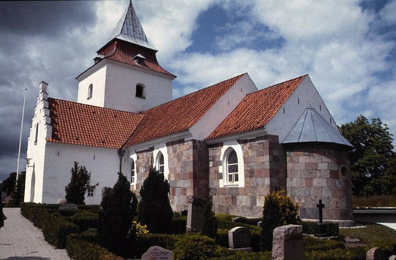 Spørring Kirke, Århus Kommune - Kirken set fra sydøst